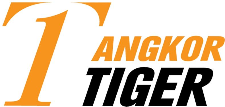 アンコールタイガーFC クラブロゴ